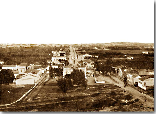 Fotografia antiga do bairro Menino Deus, em Porto Alegre, RS. Em destaque, está a primeira e antiga Igreja do Menino Deus, que foi demolida para dar lugar à atual, mais moderna.